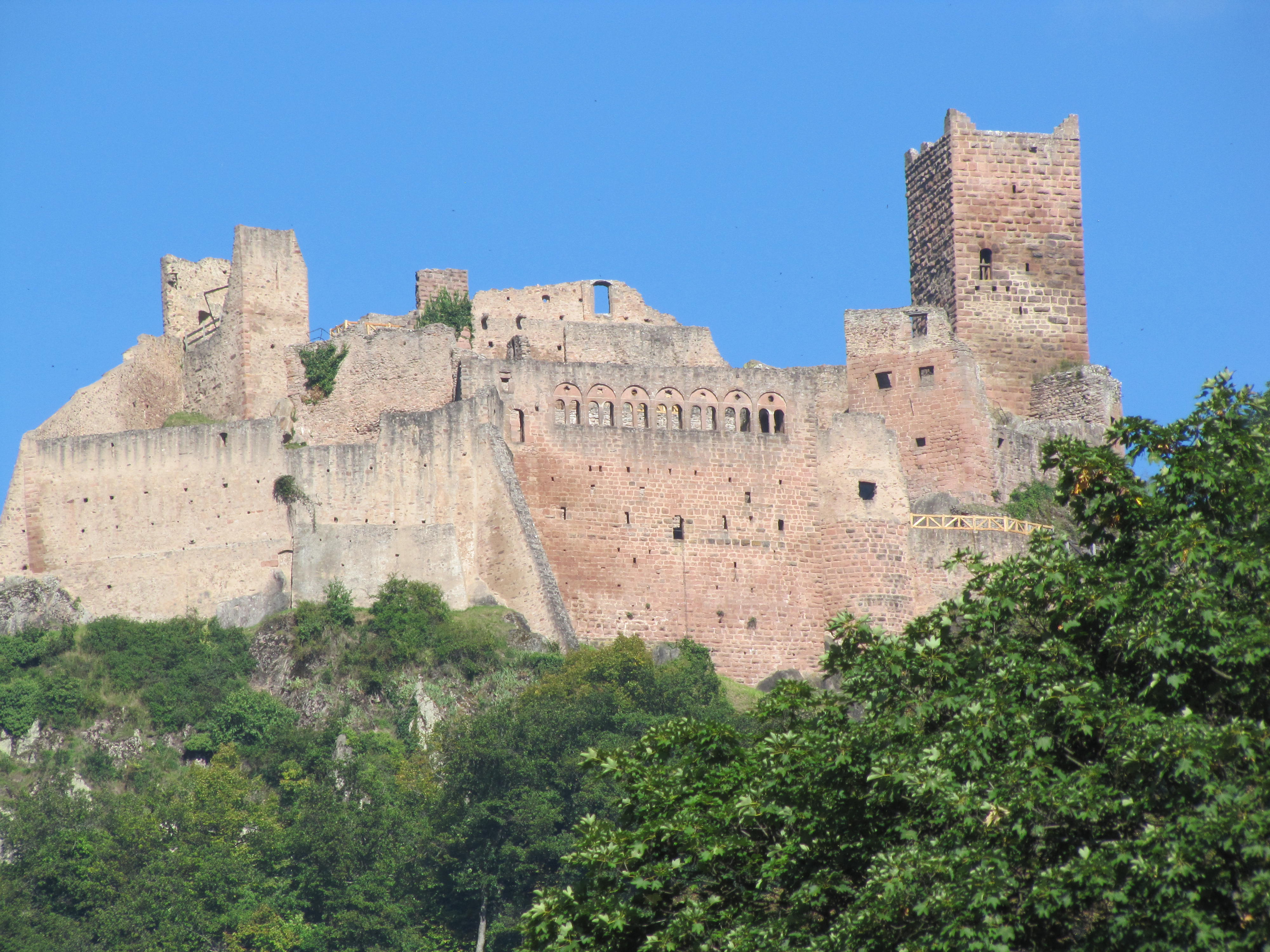 Alsace, Haut-Rhin, Ribeauvillé, Château de Saint-Ulrich (XIIIe-XIVe). It is indexed in the Base Mérimée, a database of architectural heritage maintained by the French Ministry of Culture, under the references PA00085585 and IA68007144 .